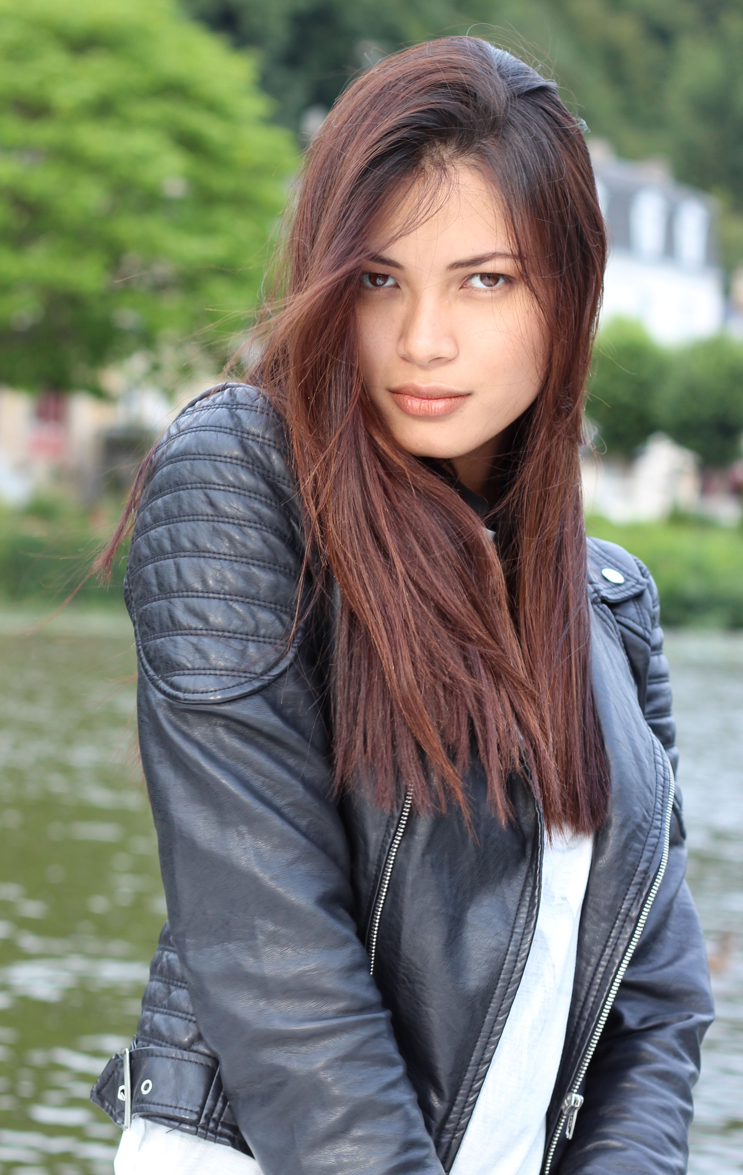 angela ruiz